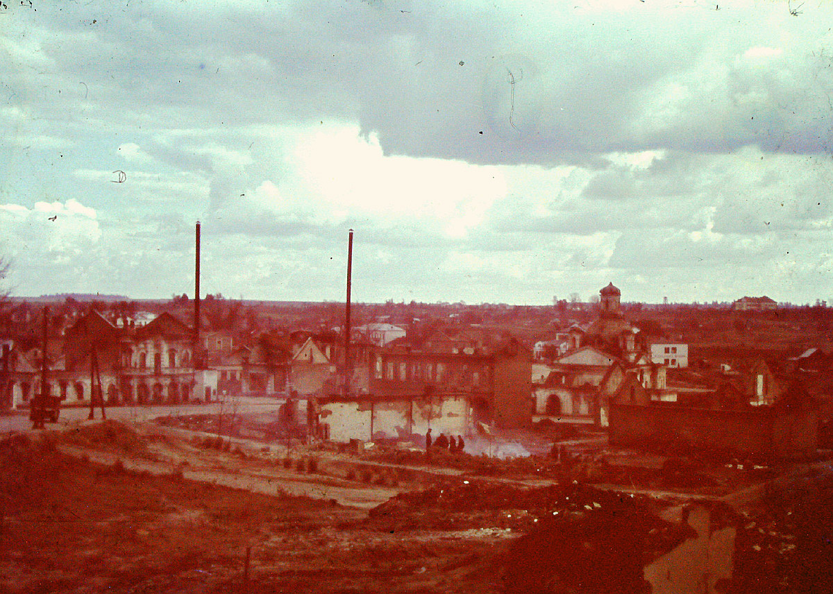 Беларуская (тарашкевіца): Ворша (Vorša), Зааршыньне (Zaaršyńnie). Царква Раства Багародзіцы